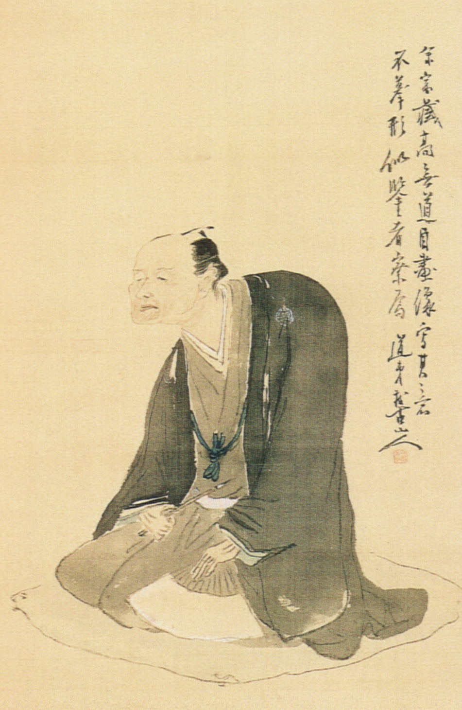 高隆古像 栃木県立博物館 高久隆古の自画像を模写したもの。自らを隆古の「道弟」としている。